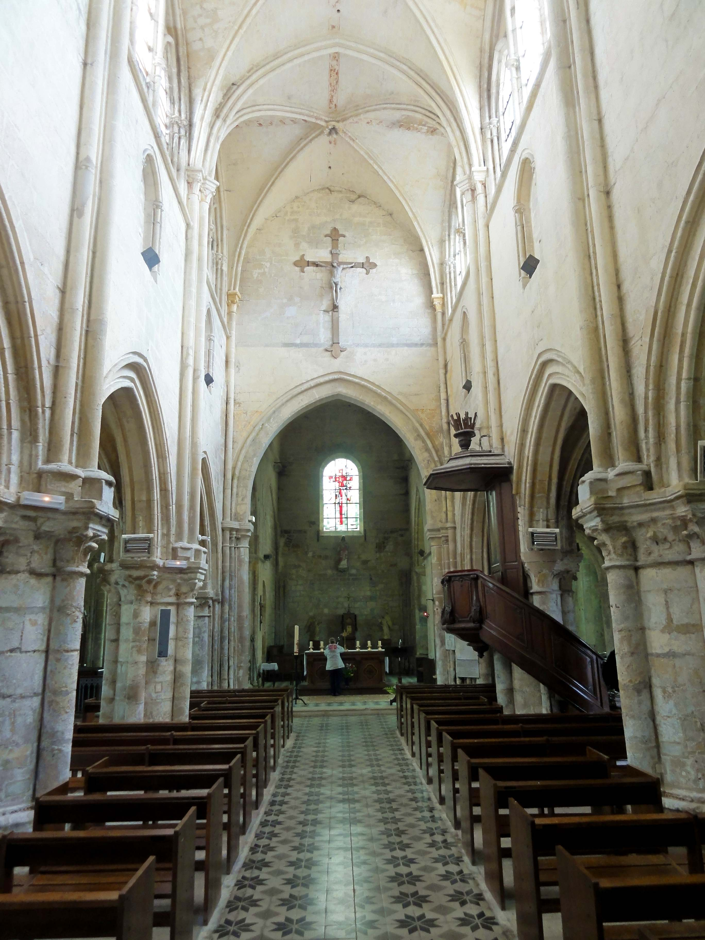 Intérieur de l'église Saint-Martin de Cires-lès-Mello (voir titre).